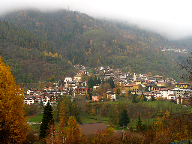 Mezzana (TN), Val di Sole, Trentino autore: Foto scattata da me l'11 novembre 2005